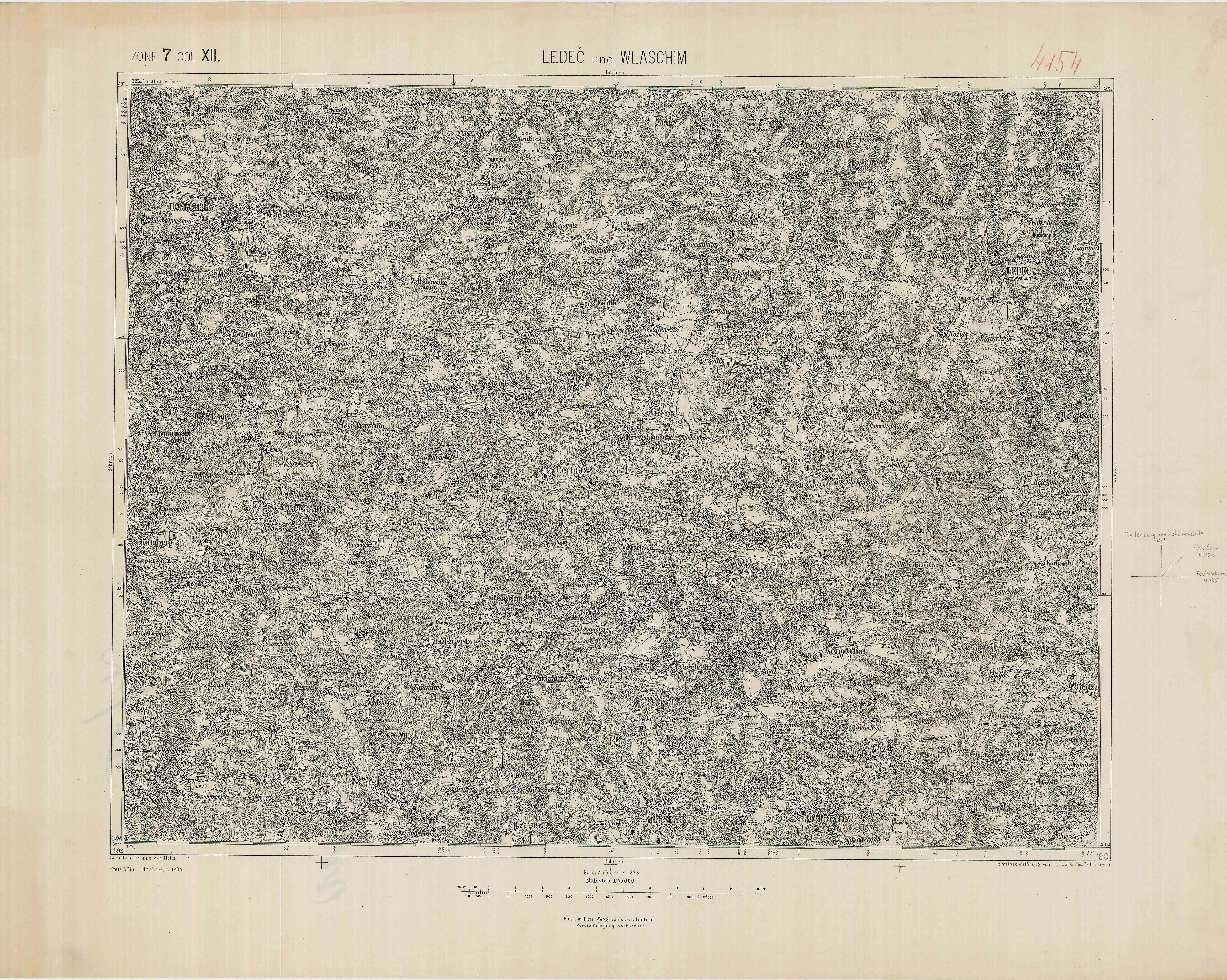 historische Landkarte: Spezialkarte 1:75.000, franzisco-josephinische (3.) Landesaufnahme der österreichisch-ungarischen Monarchie. Blatt Ledeč und Wlaschim Zone 7 Col. XII, später 4154 (mit dem Tal der Sazawa, Domaschin, Stepanow, Naceradec, Rothrecitz, Horepnik). 300 dpi abgemagerte Dateiversion.